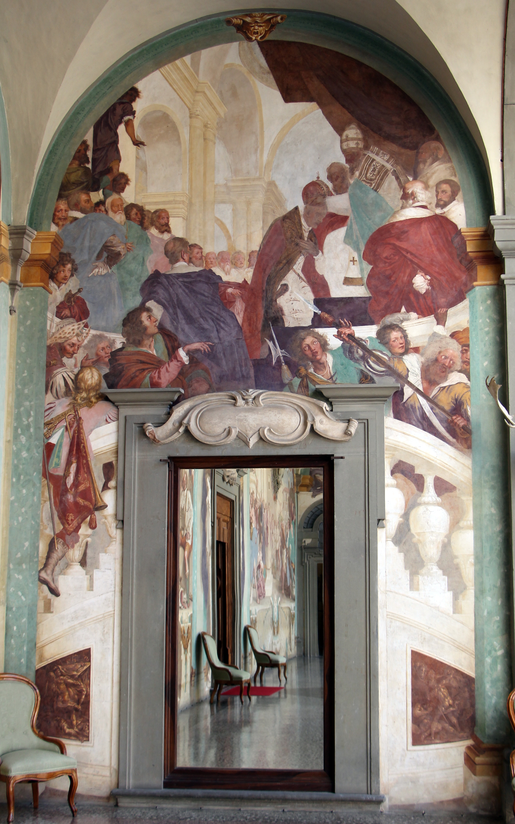 Villa medicea della Petraia - MIBAC The making of this document was supported by Wikimedia CH. (Submit your project!) For all the files concerned, please see the category Supported by Wikimedia CH. This is a photo of a monument which is part of cultural heritage of Italy.